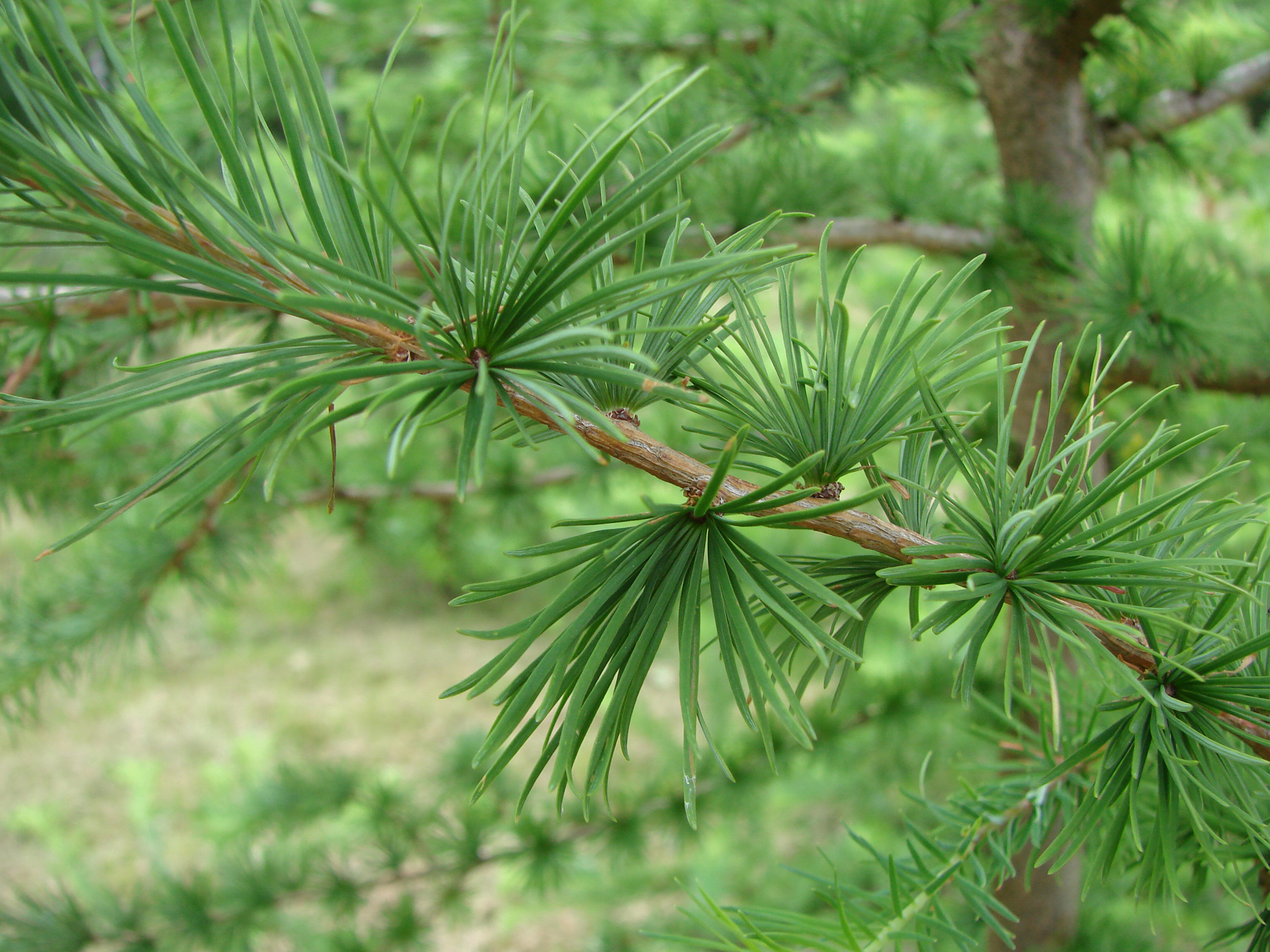 Leaves of Larix decidua.